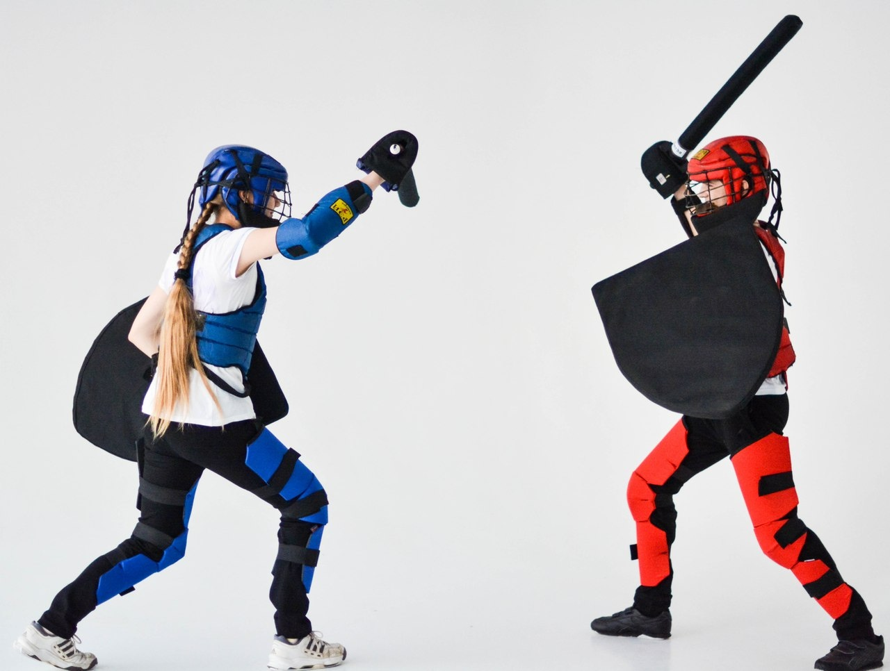 Бойцы СМБ в защитной экипировке